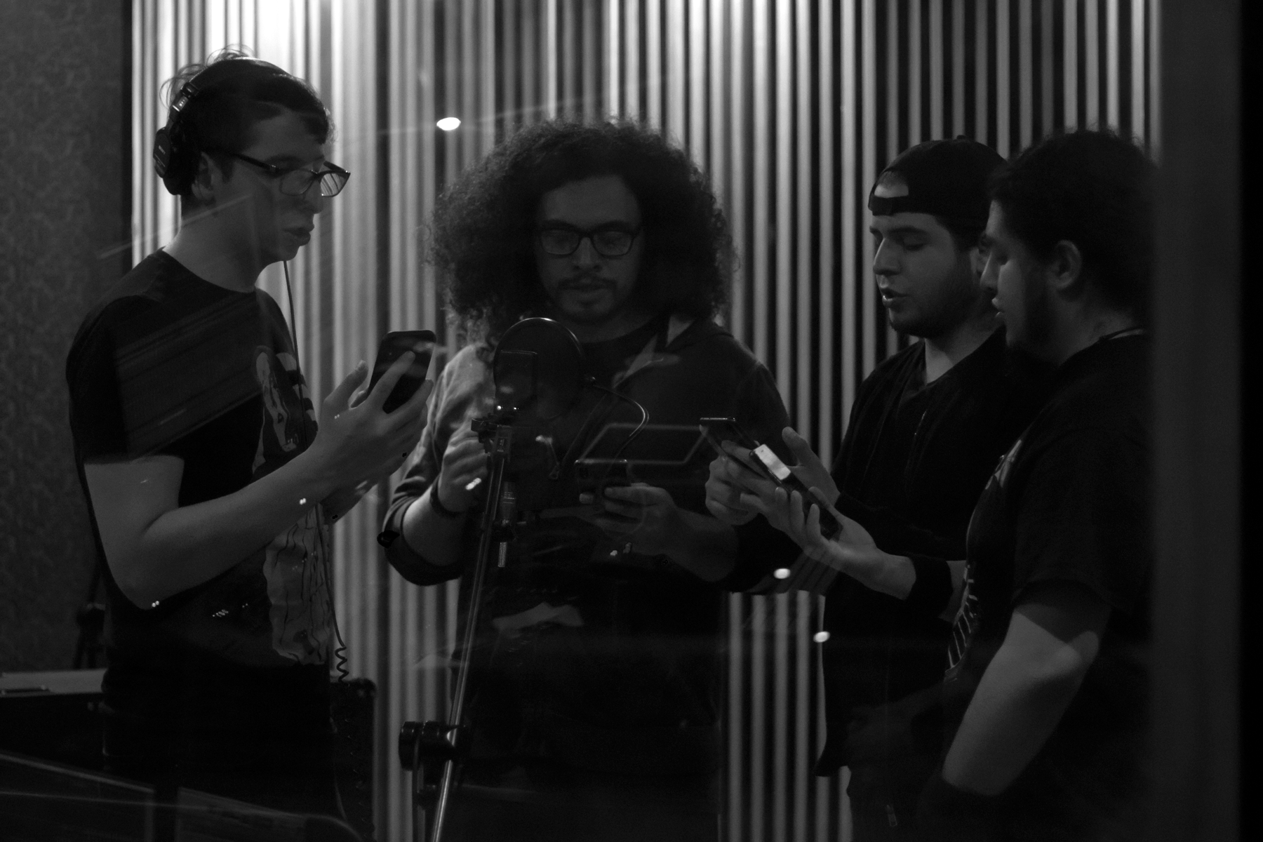 Velvet Darkness grabando su single Insomniac en el Sound Mob Studio en la Ciudad de México.